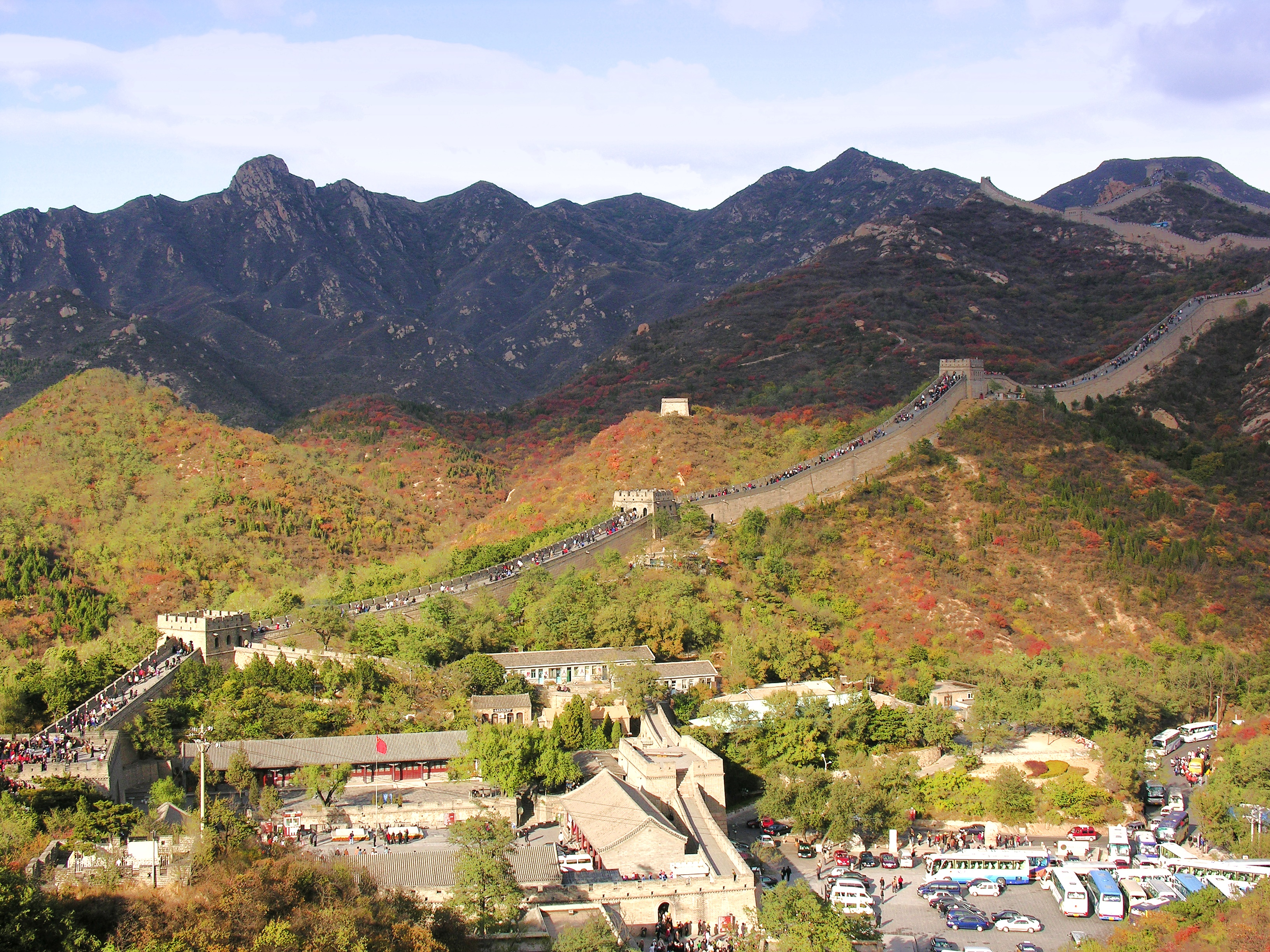 Ba Da Ling